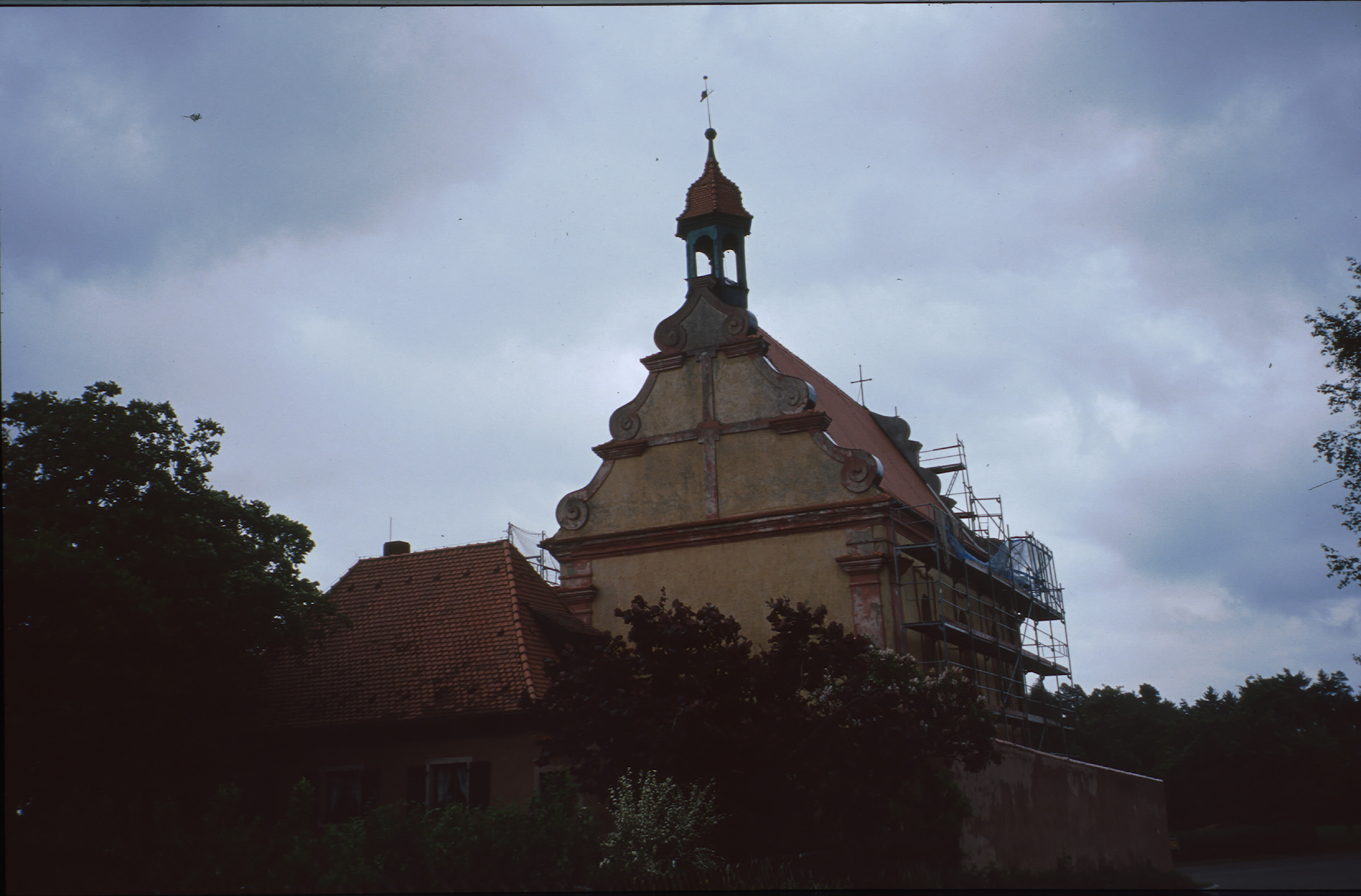 St. Ulrich